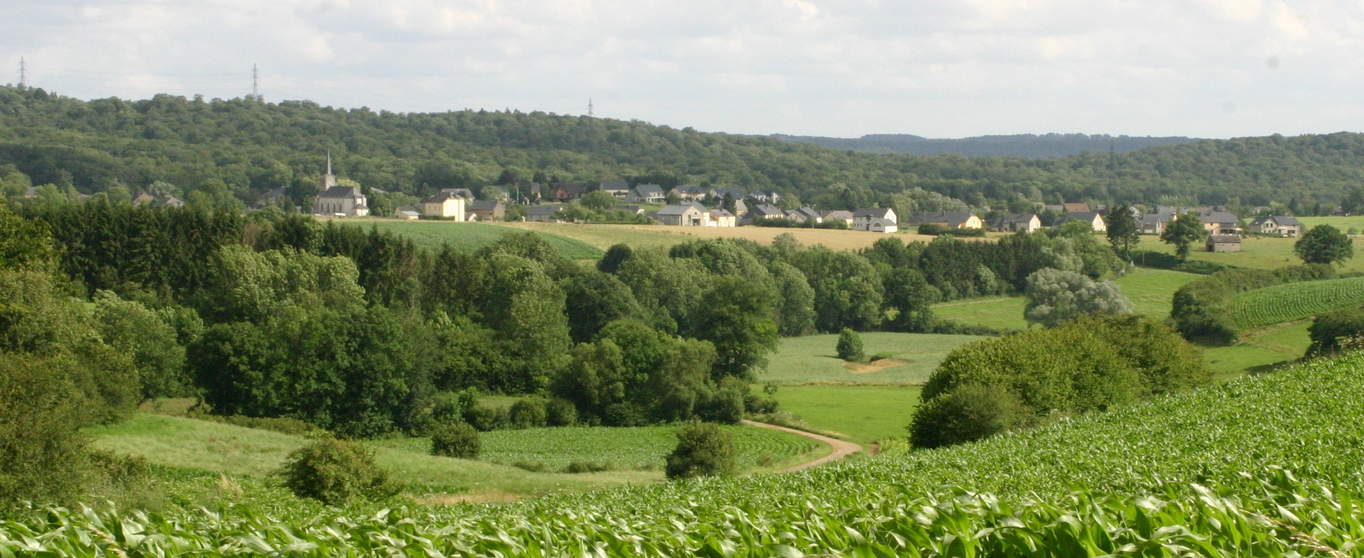 Gierleng vun der Holzstrooss aus gesinn, hannen am Bild de Rodenbusch riets a lenks de Juffernbusch.